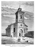 Exterior de la nueva iglesia parroquial de Hortaleza, reedificada por iniciativa de S.A.R. la princesa de Astúrias.